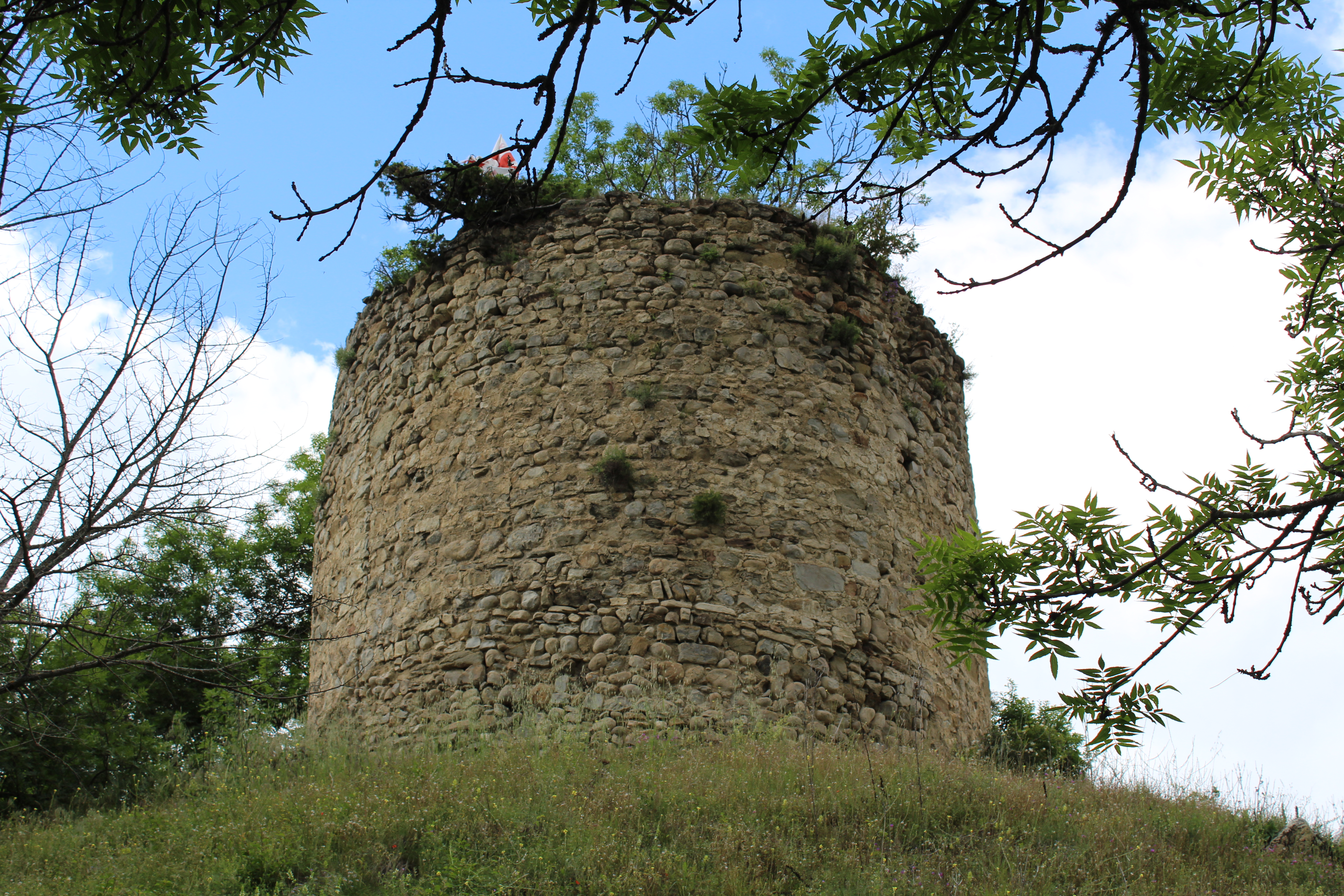 წმ. გიორგის ეკლესია